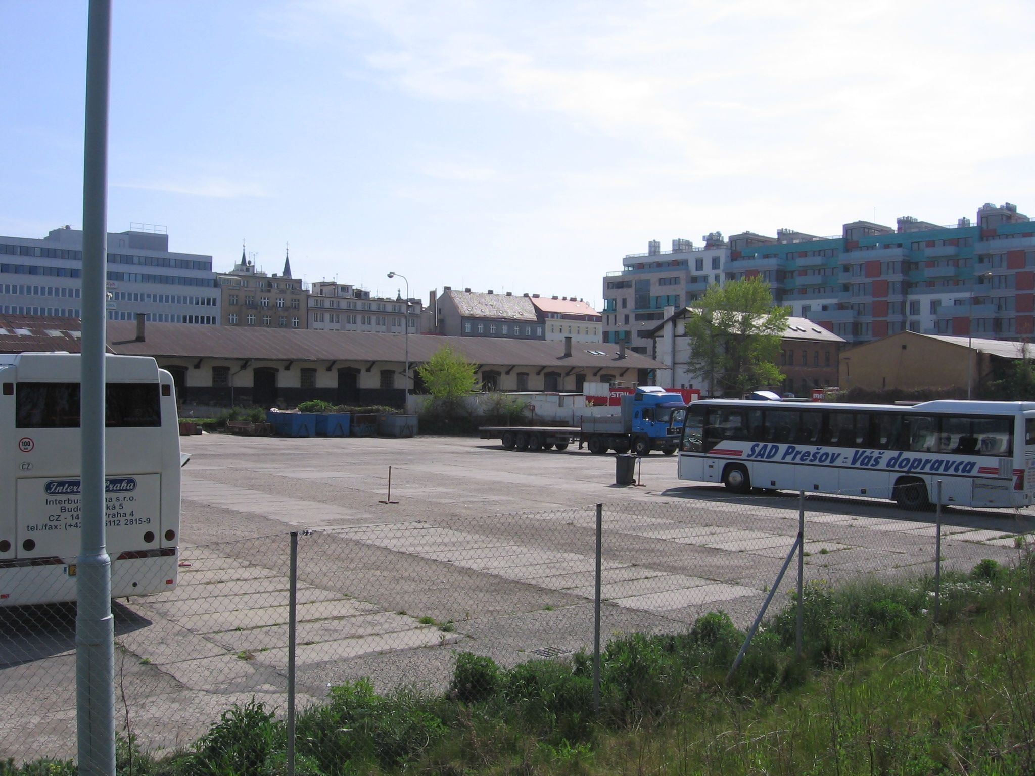 Rohanský ostrov, bývalé nádraží a nová zástavba. Autobusy Interbus Praha a SAD Prešov.